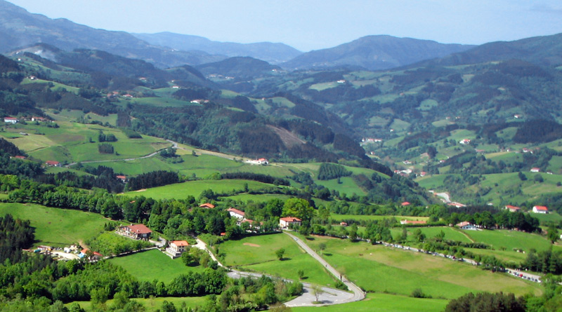 Gipuzkoako Abaltzisketa udalerriko Larraitz auzoa.